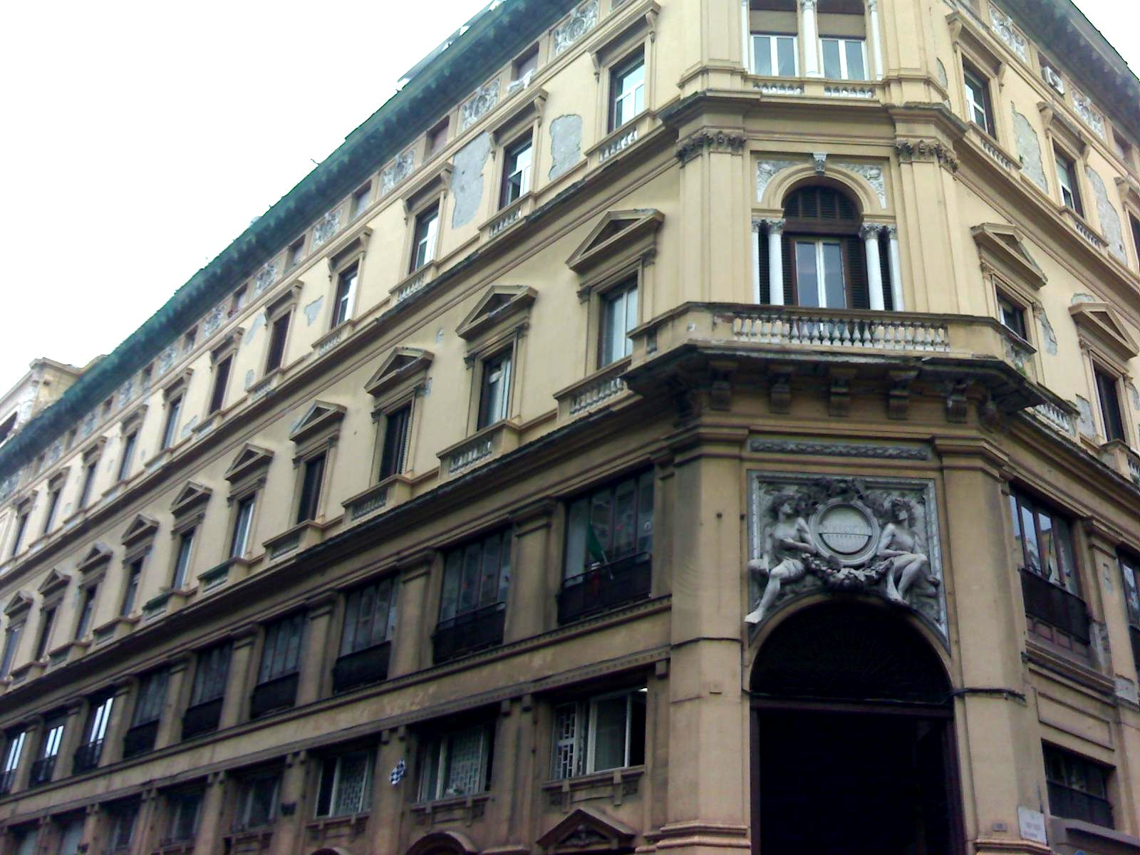 Palazzo Capone (Napoli)